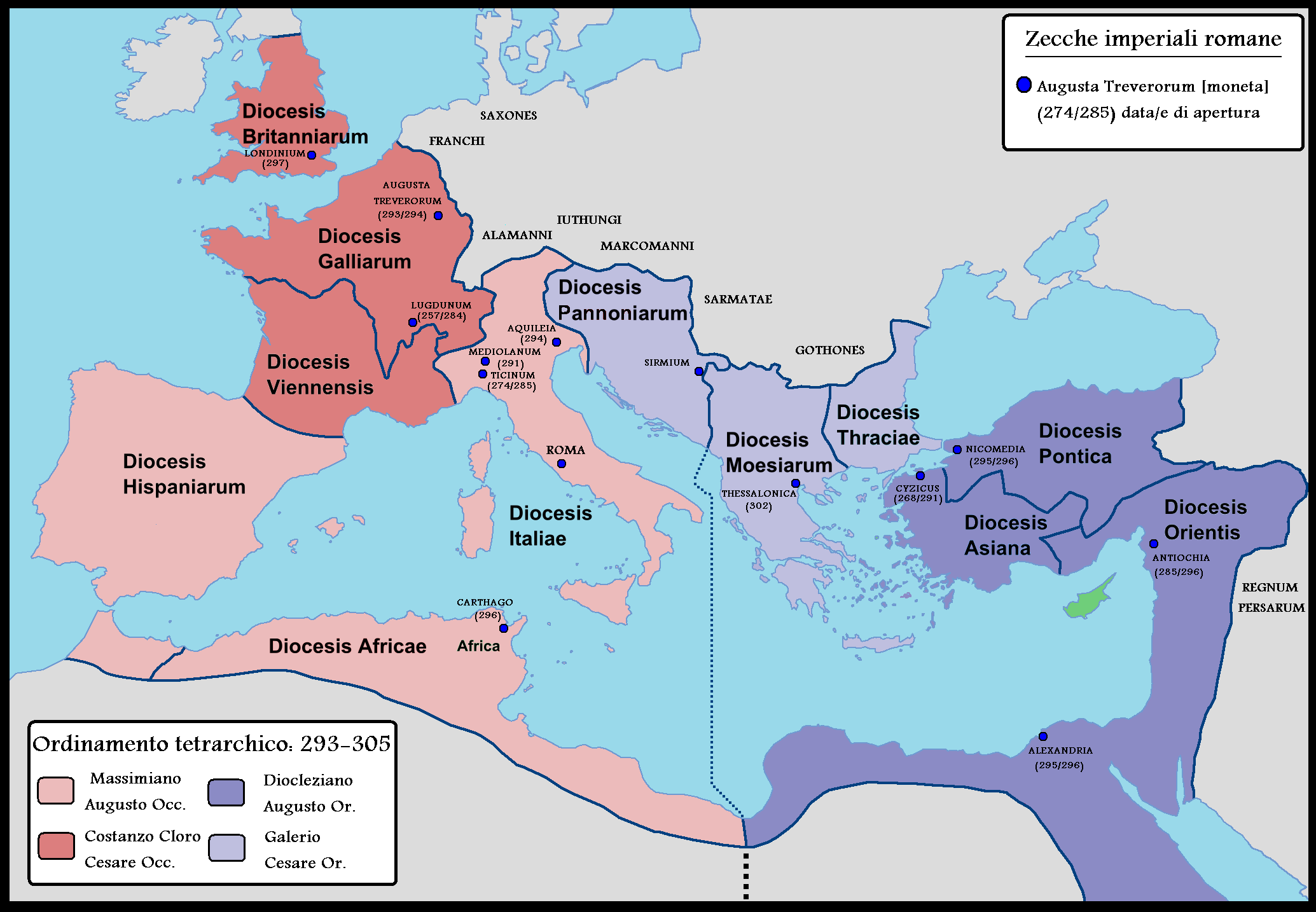 Zecche imperiali tetrarchiche